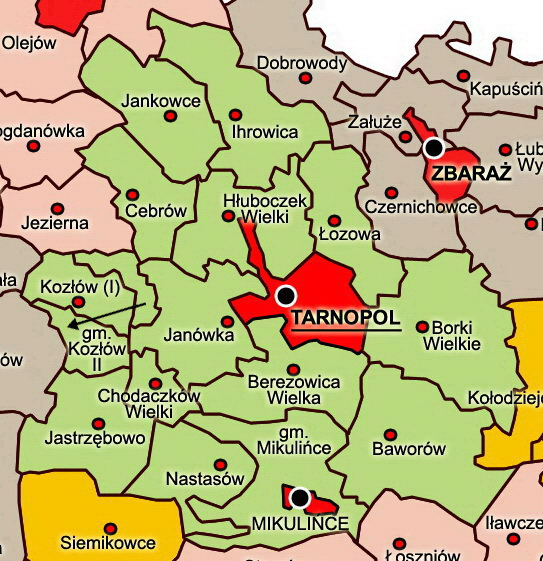 Administrative_Map_1938._-_pow._Tarnopol.jpg: Тернопільський повіт, фрагмент адміністративної карти 1938р.